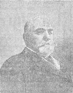 Marqués de Teverga, fotografiado por Compañy.